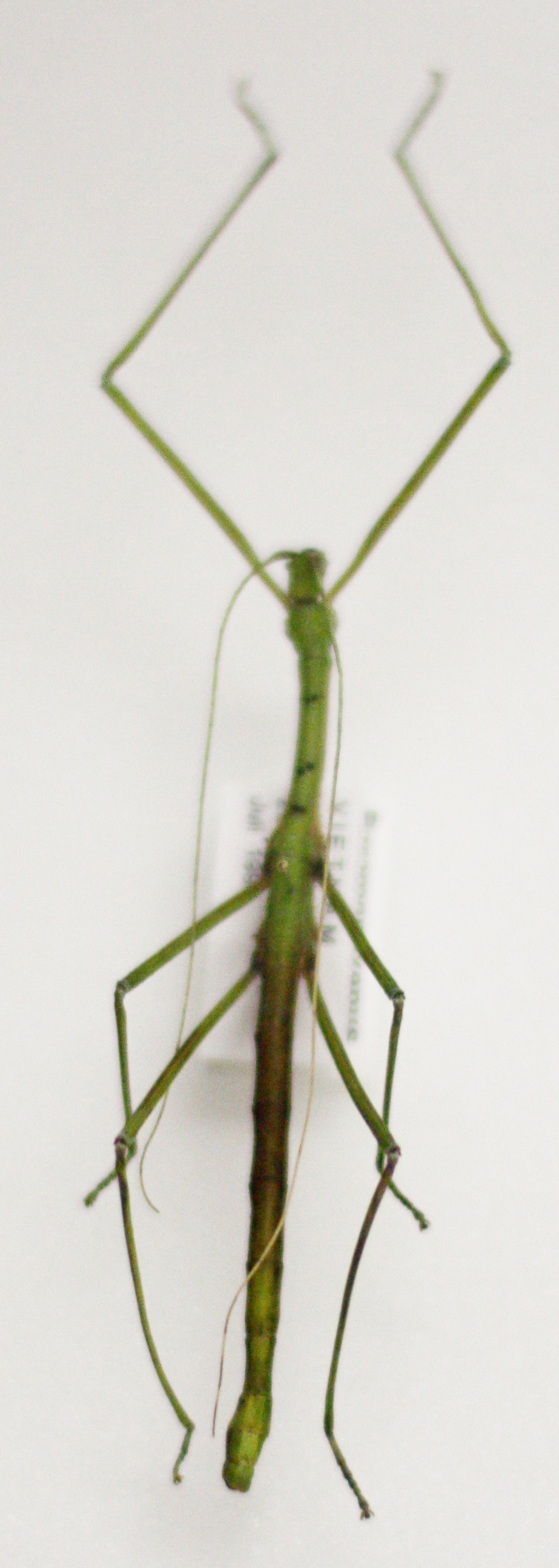 Naturkundliche Sammlung Übermaxx Überseenuseum Bremen; Schmetterlinge und andere